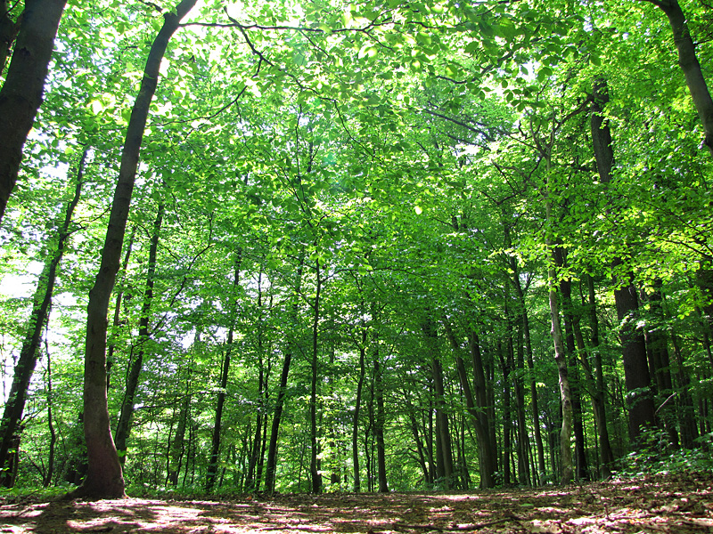 Der Schwerter Wald in Schwerte, Nordrhein-Westfalen